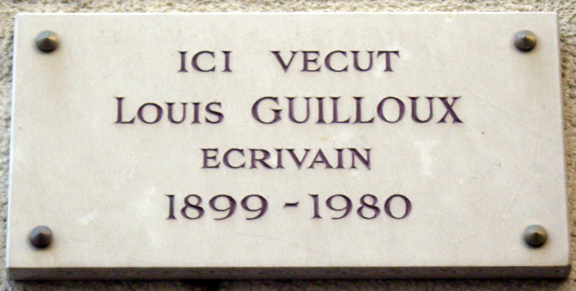 Plaque apposée au n° 42 de la rue du Dragon, Paris 6e, où vécut l'écrivain Louis Guilloux (1899-1980).